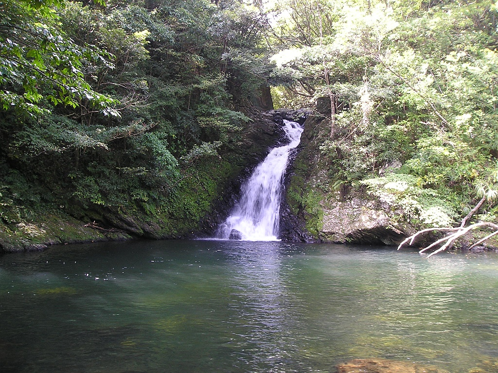 鹿児島県（奄美大島）大島郡大和村にある「マテリヤの滝」。 Photo by Si-take. Sep.2005